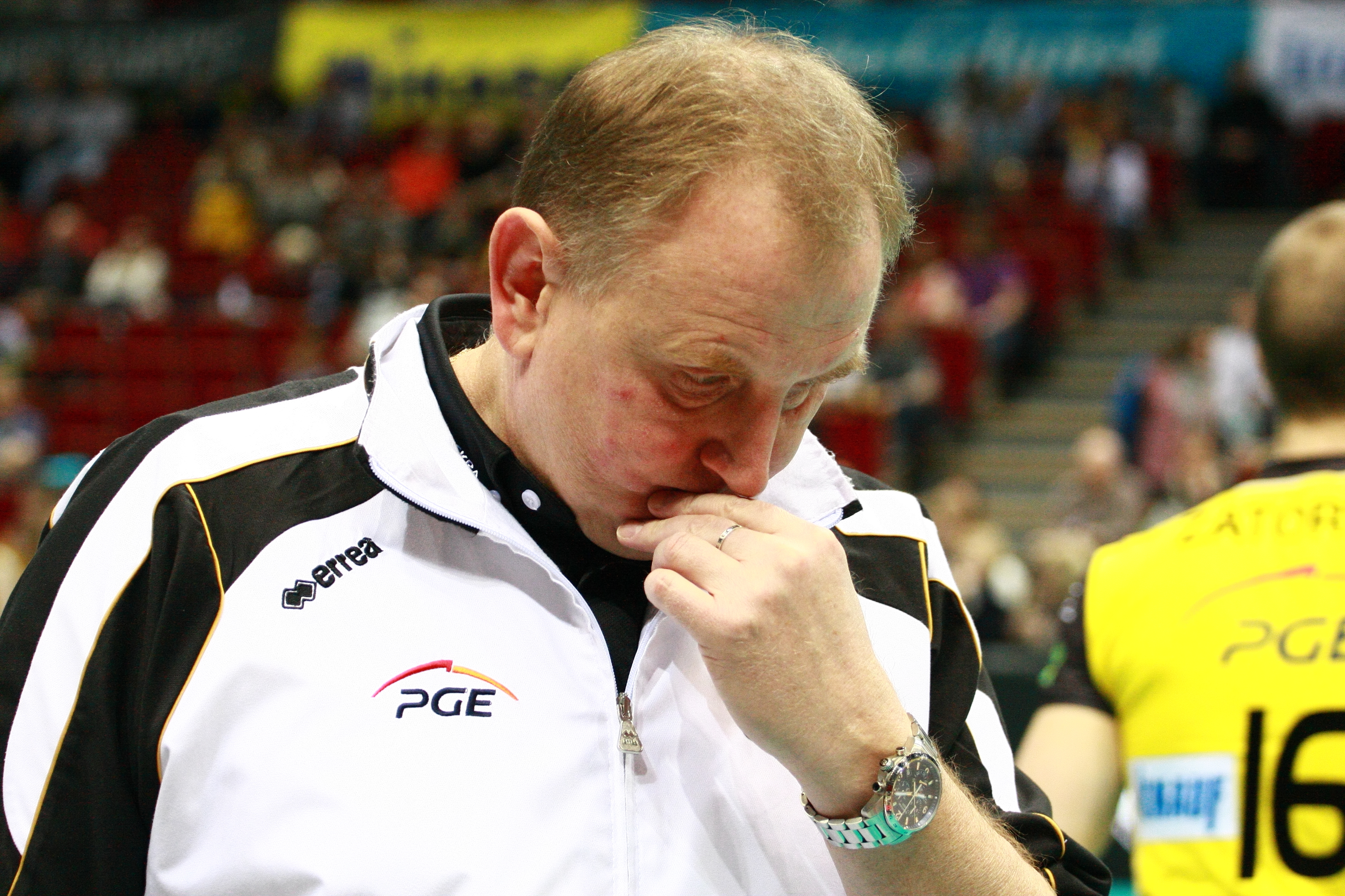 Lotos Trefl Gdańsk vs Skra Bełchatów